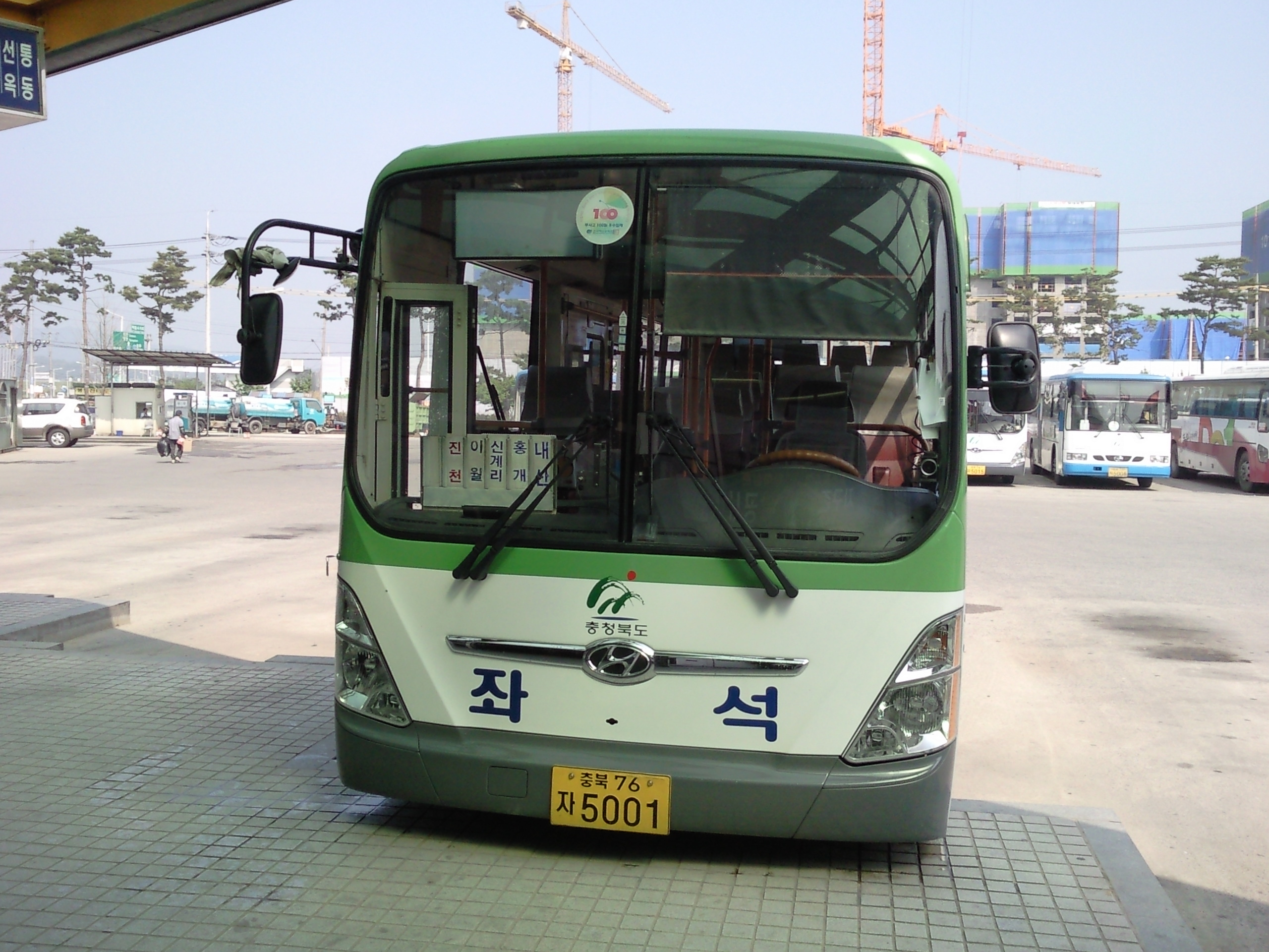 진천터미널에서 출발 대기중인 음성교통 버스